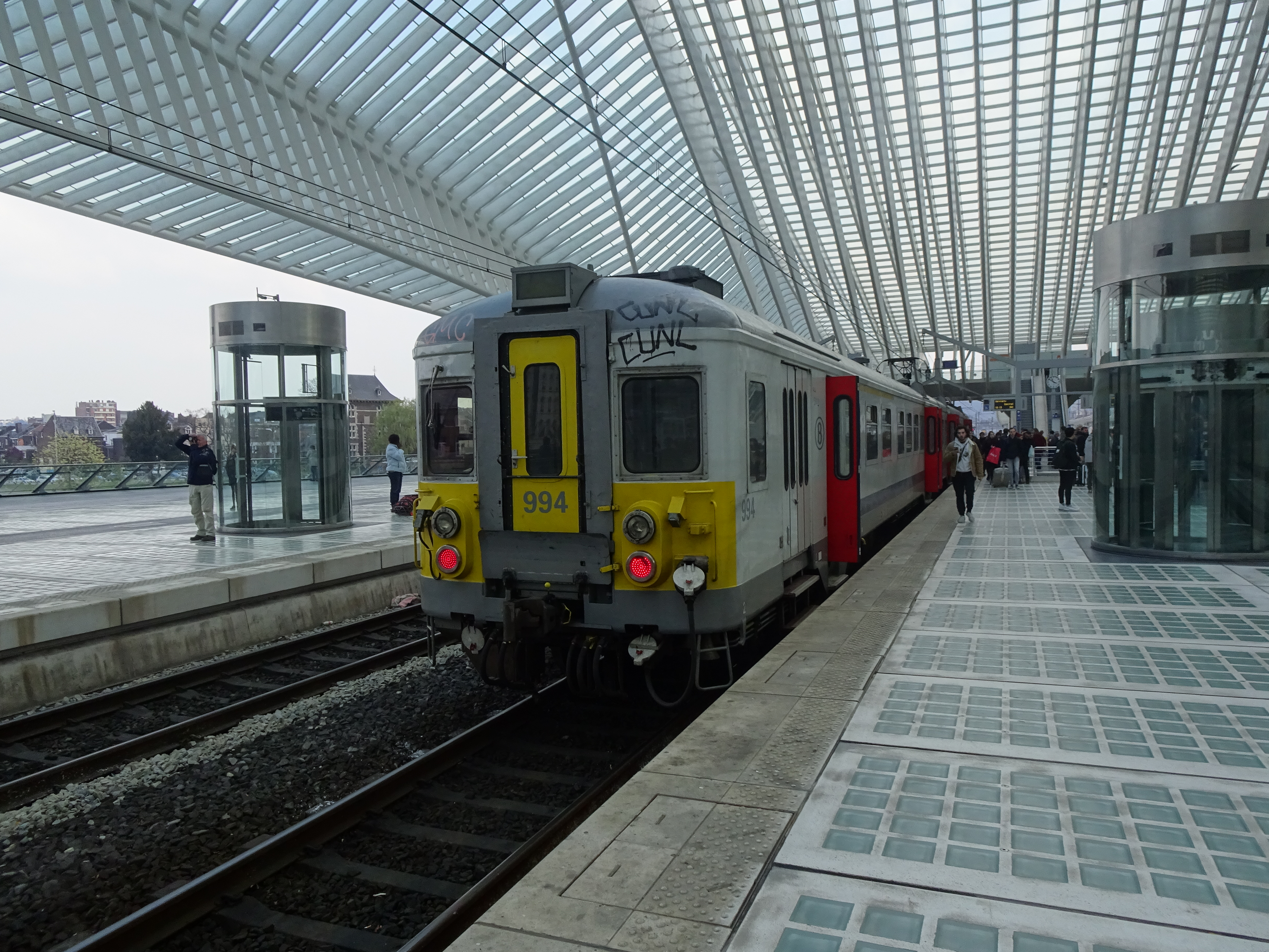 La 994 fait demi-tour à Liège-Guillemins avant de repartir vers Verviers. En raison de travaux, il n'y avait aucun train sur la ligne 34 vers Liège-Saint-Lambert.